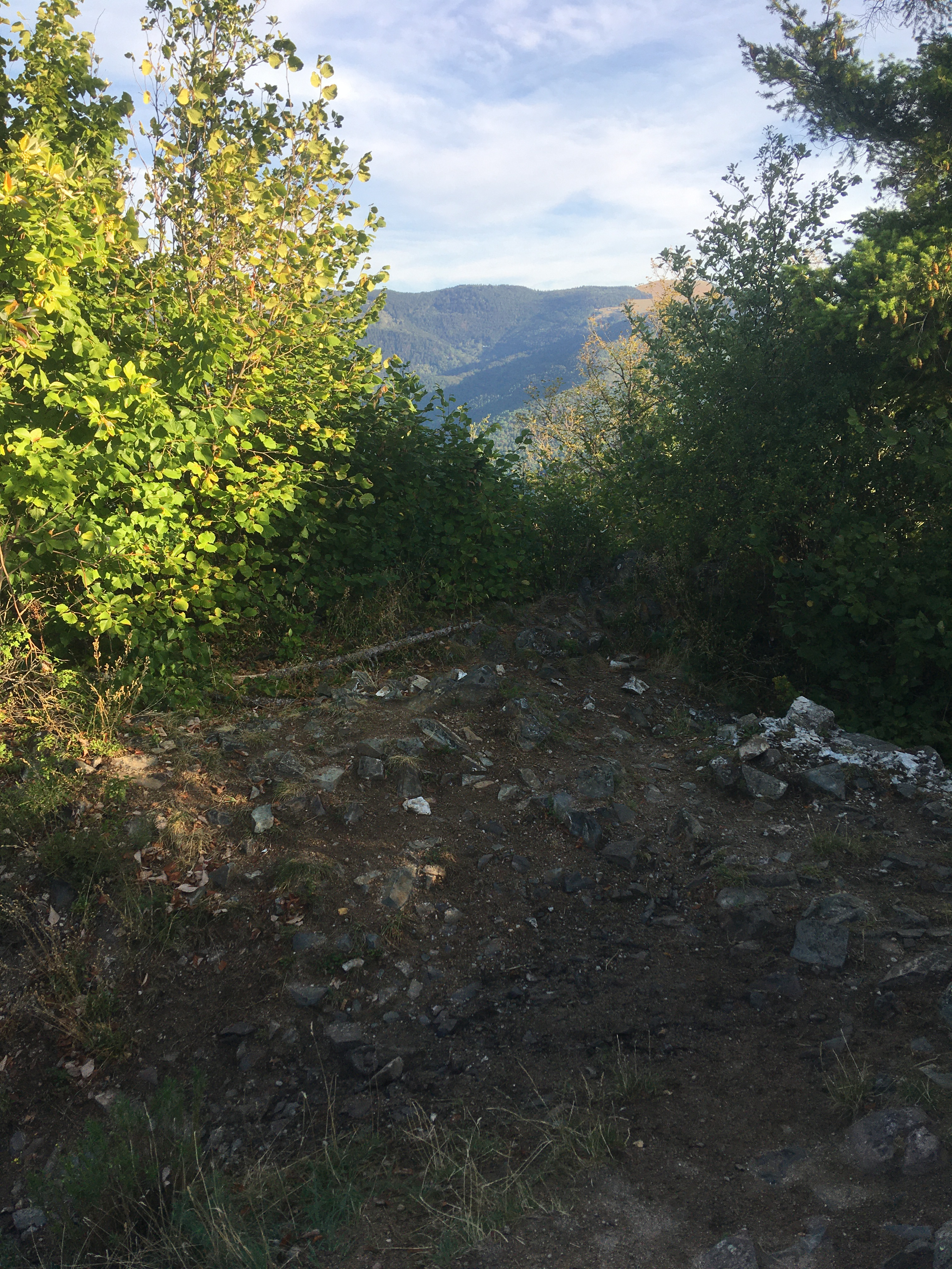 Ruines du château de Hohrupf. Prise de vue Août 2020 lors d'une randonnée pedestre.